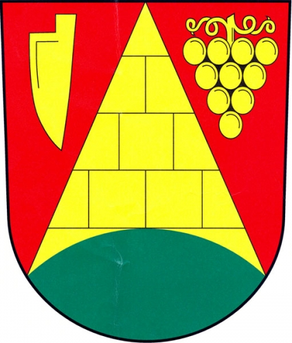 znak, Rapotice, okres Třebíč